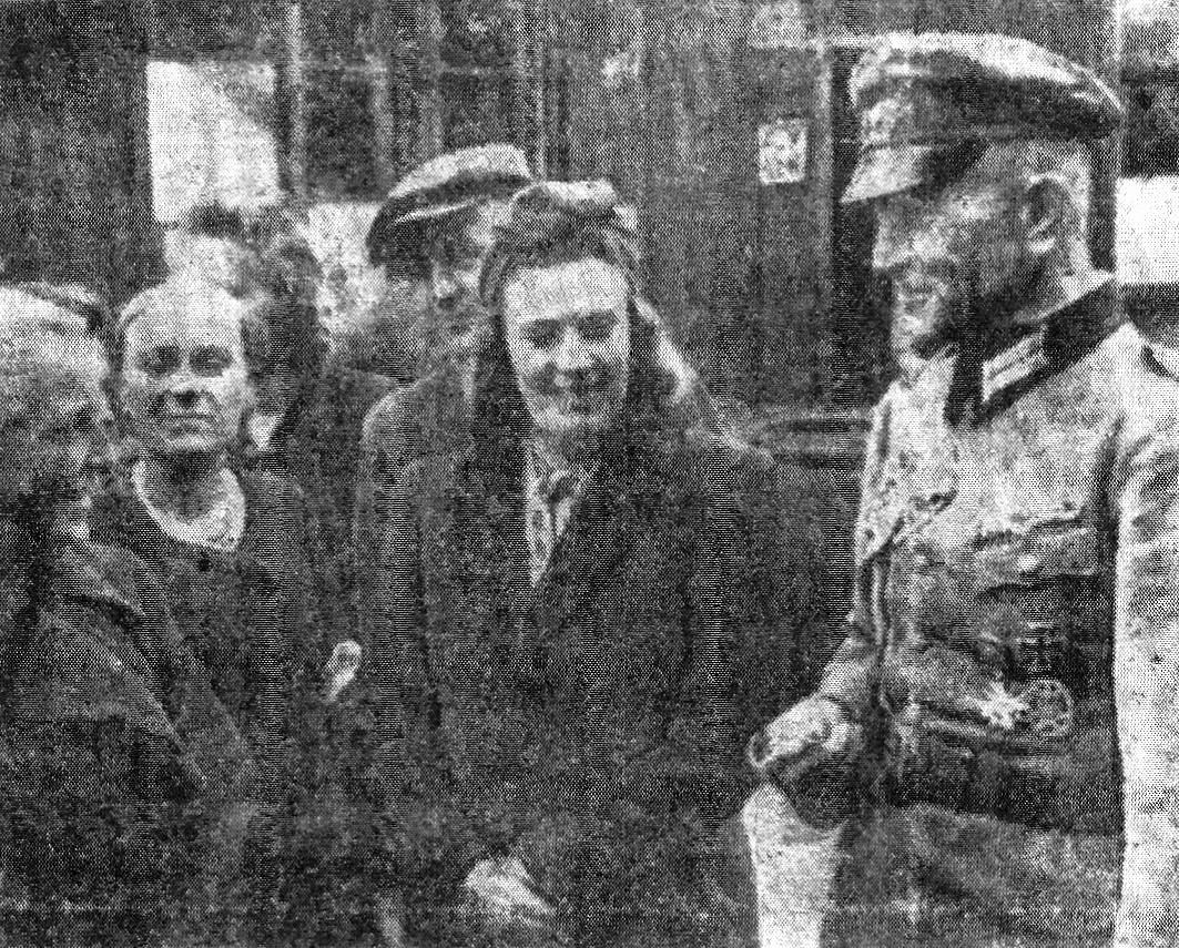 Płk. Kurt Sieber, komendant Durchgangslager 121 Pruszków, podczas wizytacji kuchni obozowej